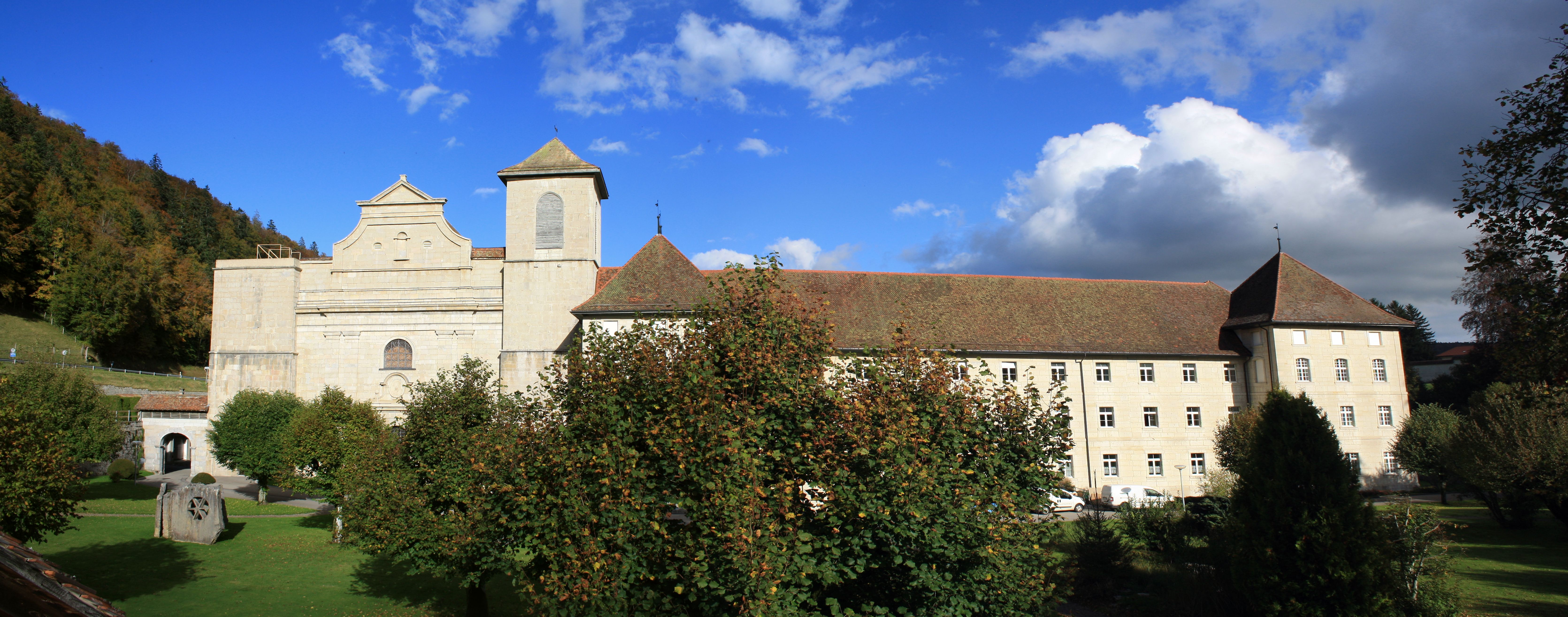 Abtei Bellelay